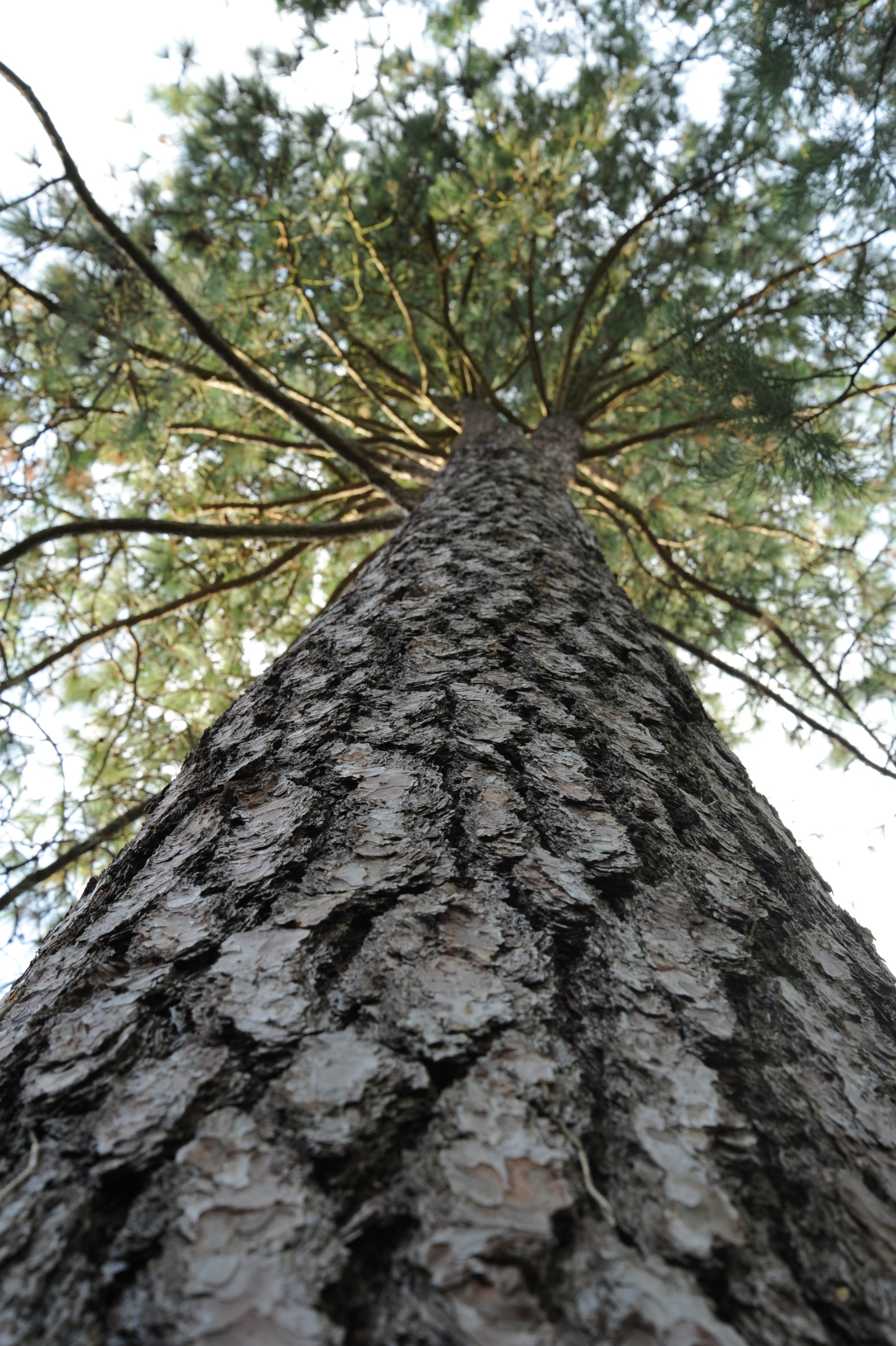 Pinus ponderosa Dougl.- Pin à bois lourd